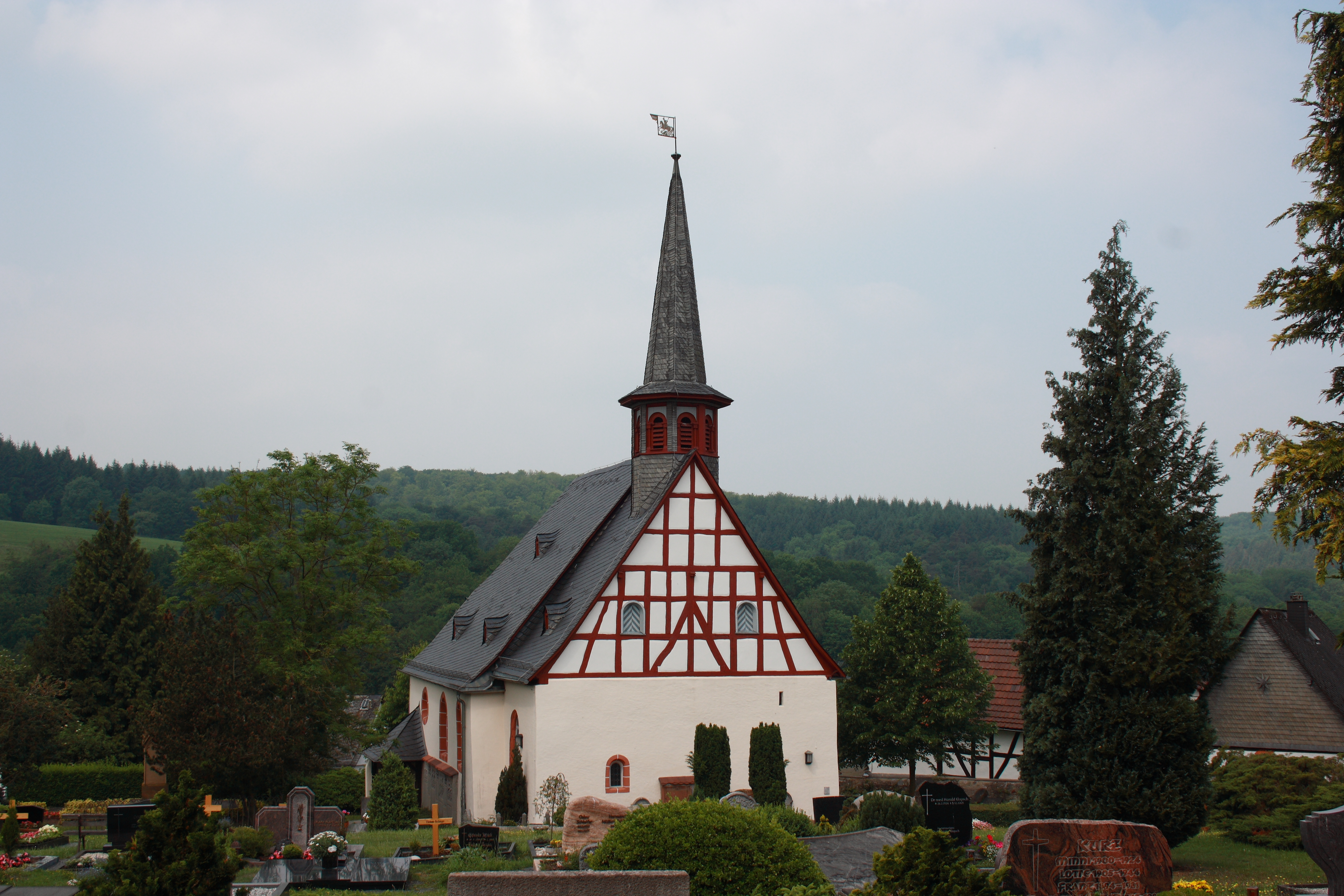 Evangelische Friedhofskirche St. Georgen, St.-Georg-Straße 19, Braunfels (Hessen)